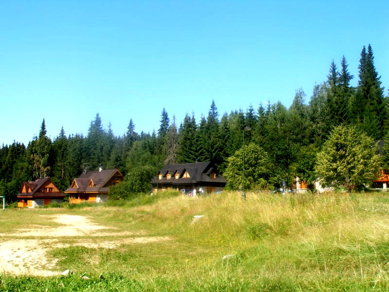 Osada Podbanské